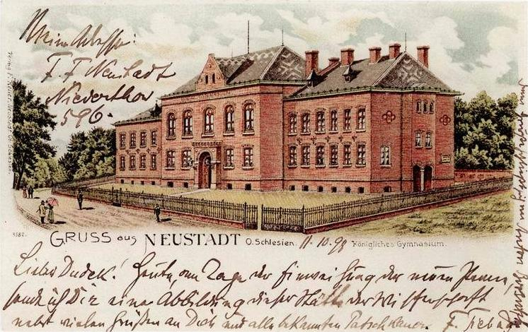 Prudnik, niemiecka pocztówka, przedstawiająca dzisiejsze I prudnickie LO